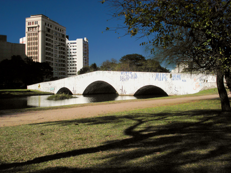 Ponte de Pedra, no Largo dos Açorianos, Porto Alegre, Brasil.